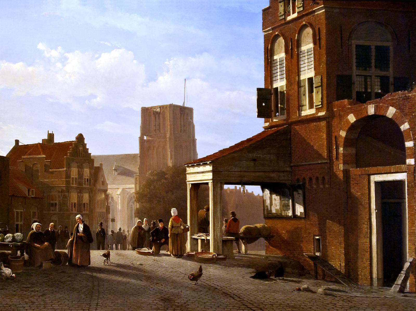 Jan Weissenbruch, De vismarkt van Woudrichem, ca. 1850 Jan Weissenbruch De vismarkt van Woudrichem, ca. 1850